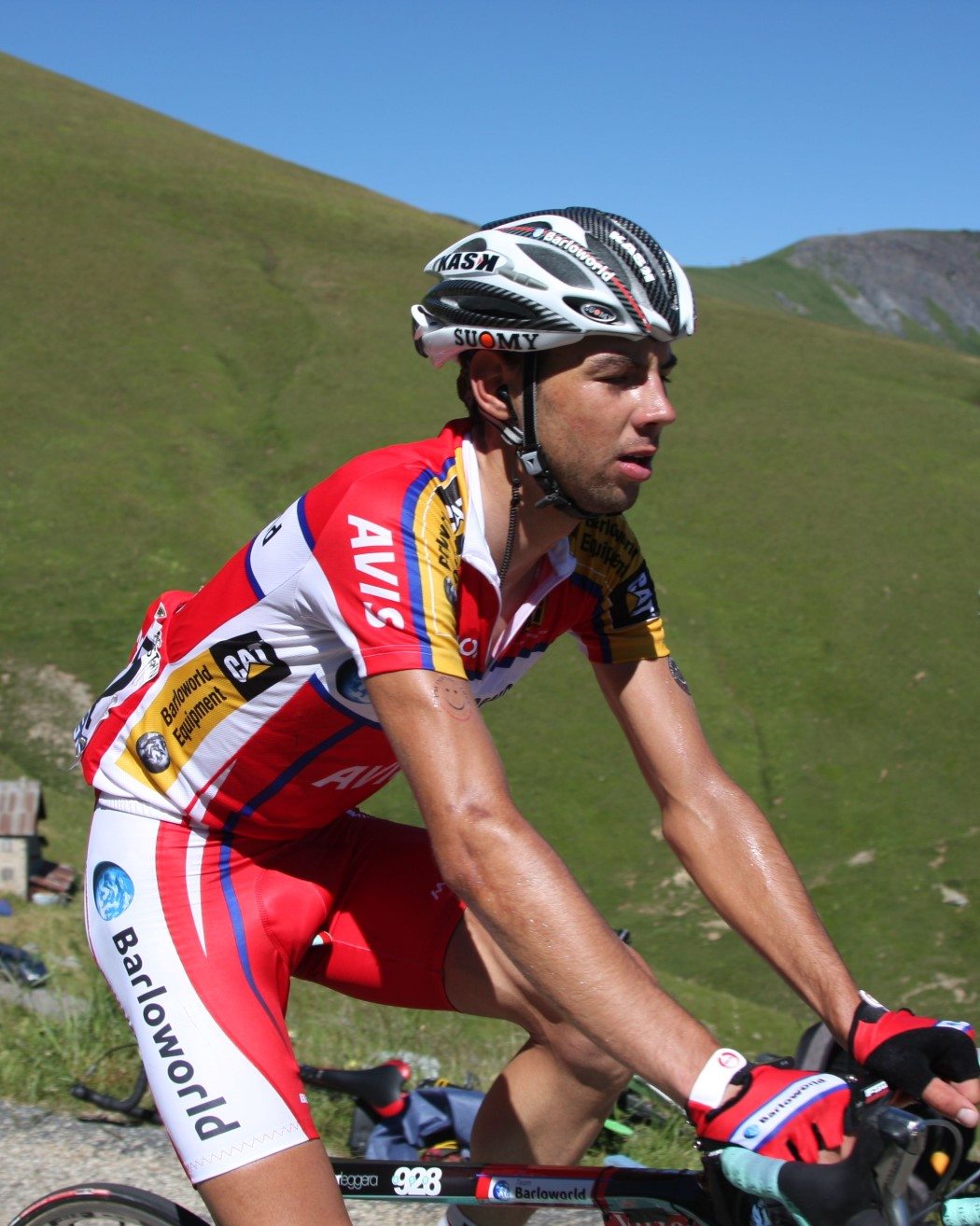 7677 augustyn